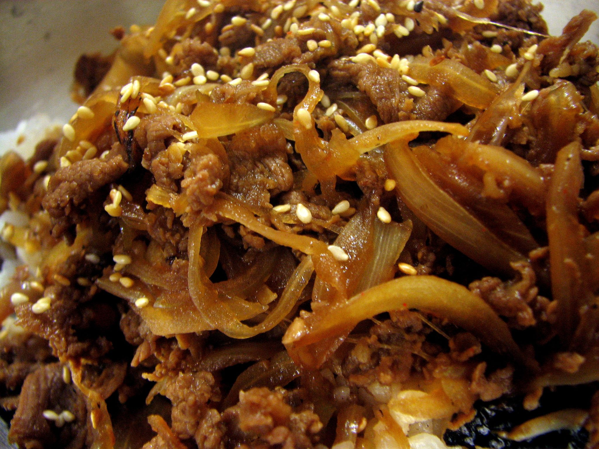 불고기, Bulgogi